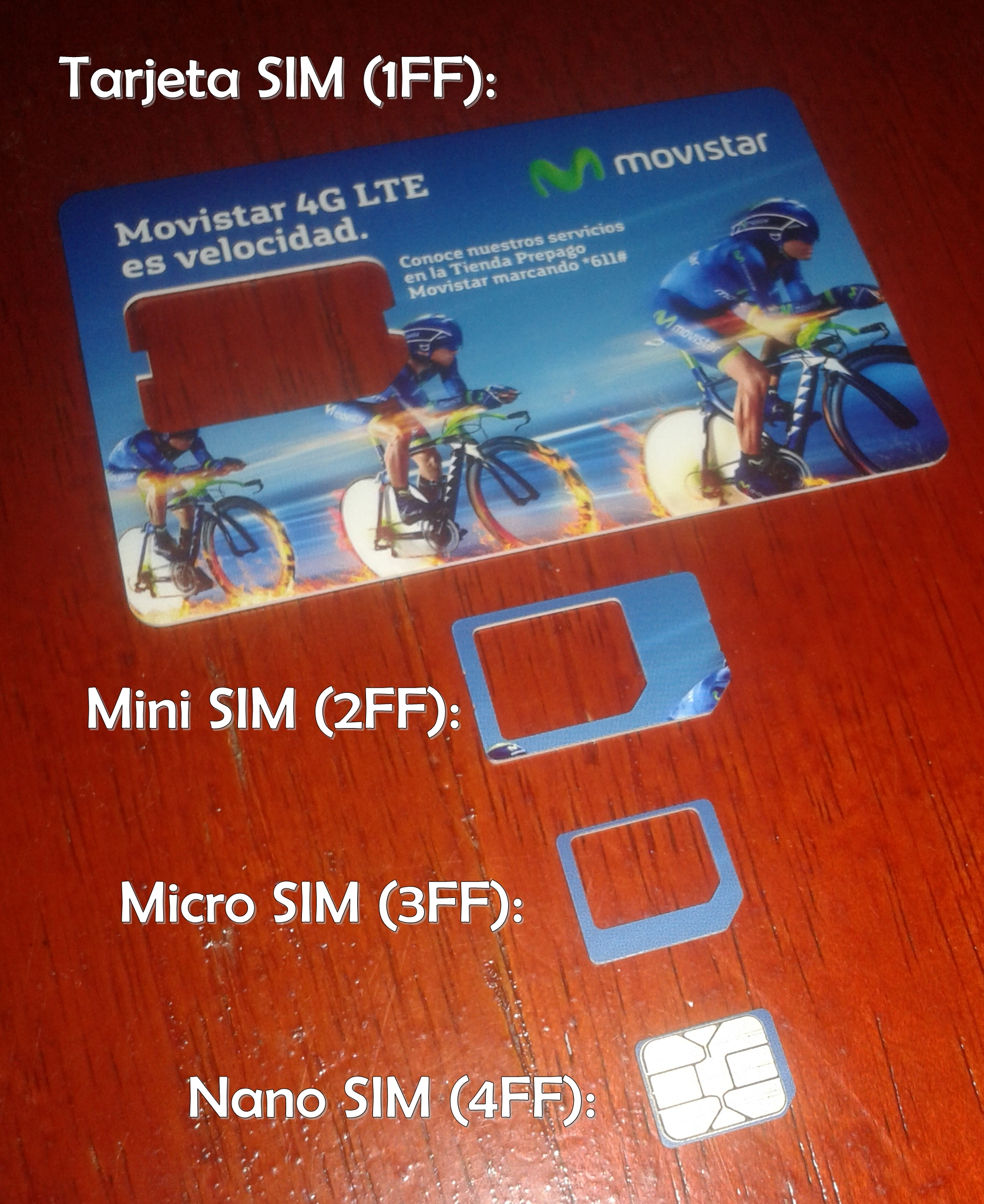 Tamaños según Tarjeta SIM Prepago de Movistar Colombia: Tarjeta SIM, Mini SIM, Micro SIM y Nano SIM respectivamente.